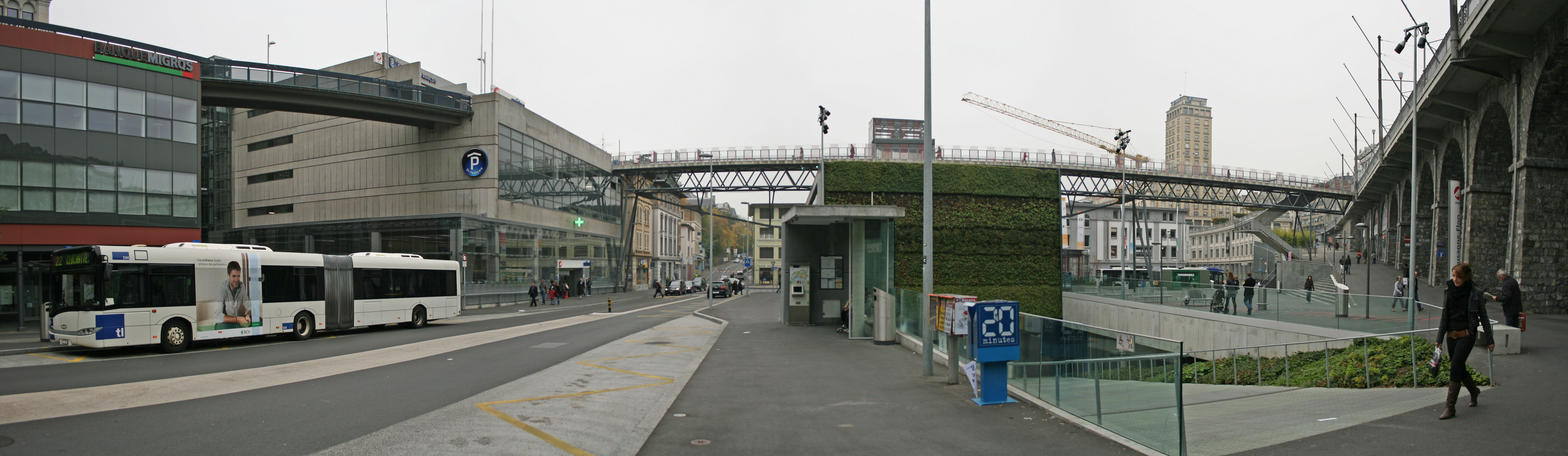 Panoramaansicht von Lausanne Flon mit Metrostation in der Mitte des Platzes